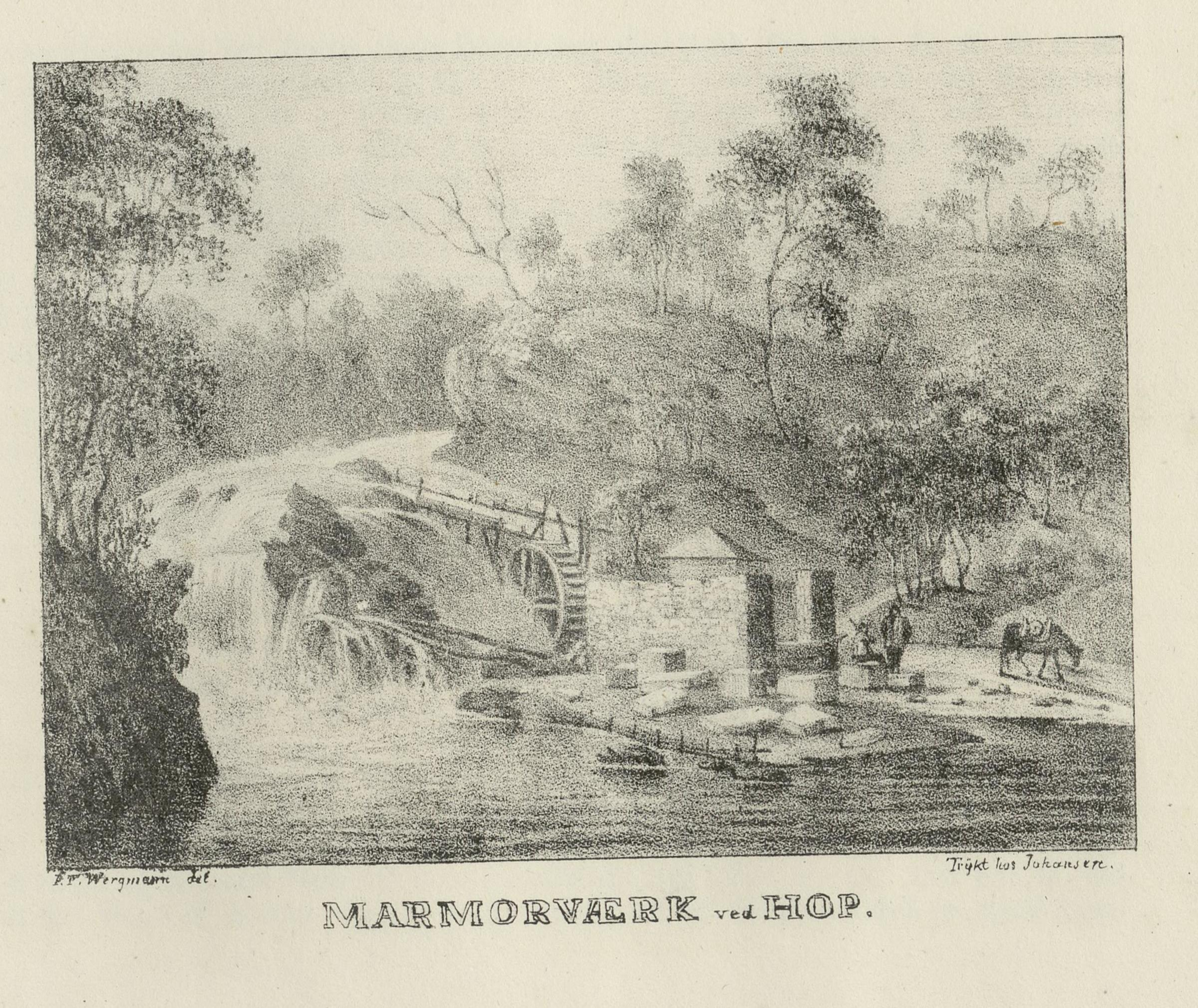 Illustrasjon hentet fra boken "Norge, fremstillet i lithographerede Billeder efter Naturen" av Wergmann, P.F. og utgitt av P.F. Wergmann (Christiania, 1836-1837)